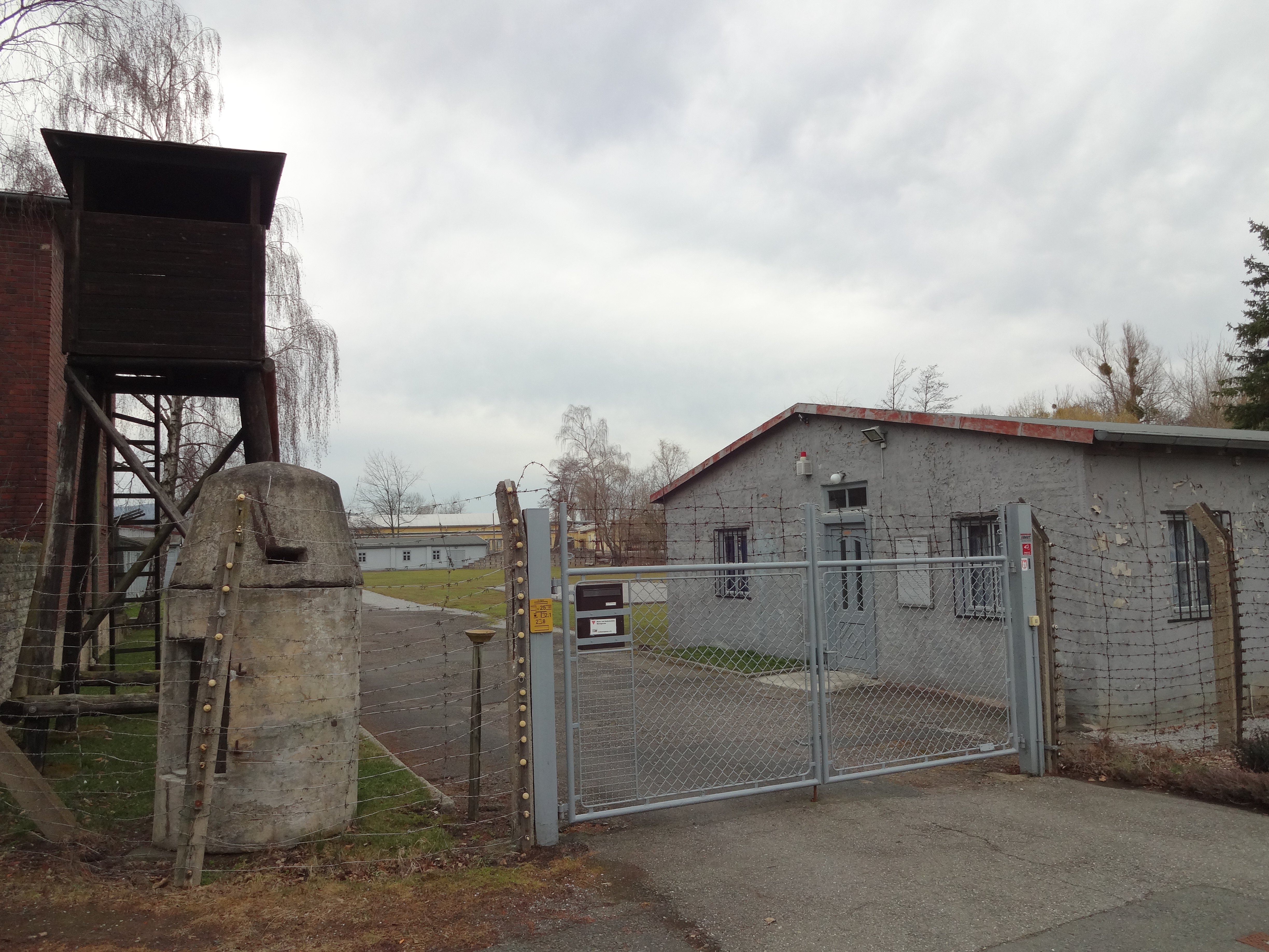 denkmalgeschütztes Konzentrationslager im Veckenstedter Weg 43 in Wernigerode